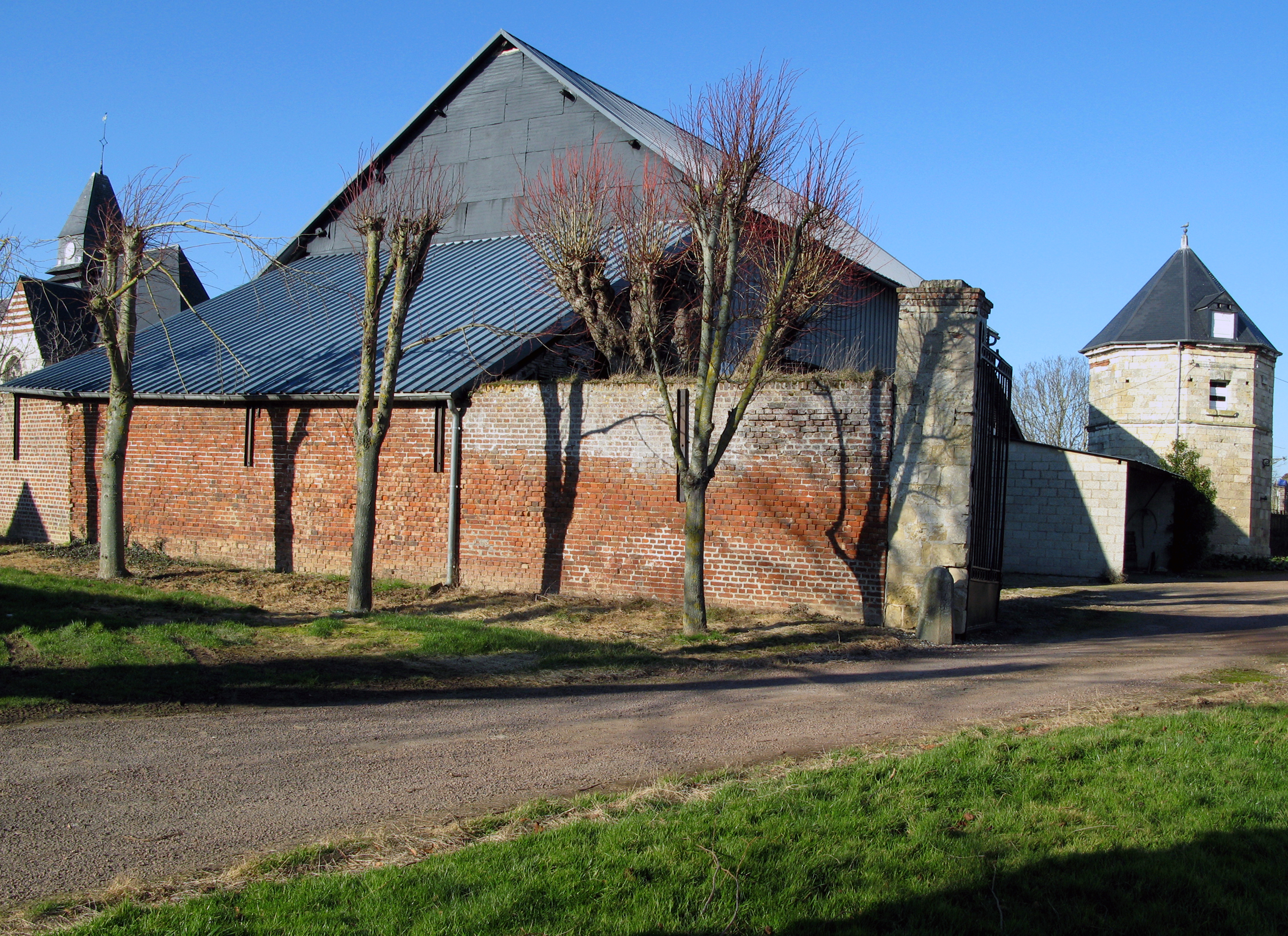 Louvrechy (Somme, France) - L'église et le colombier. . .